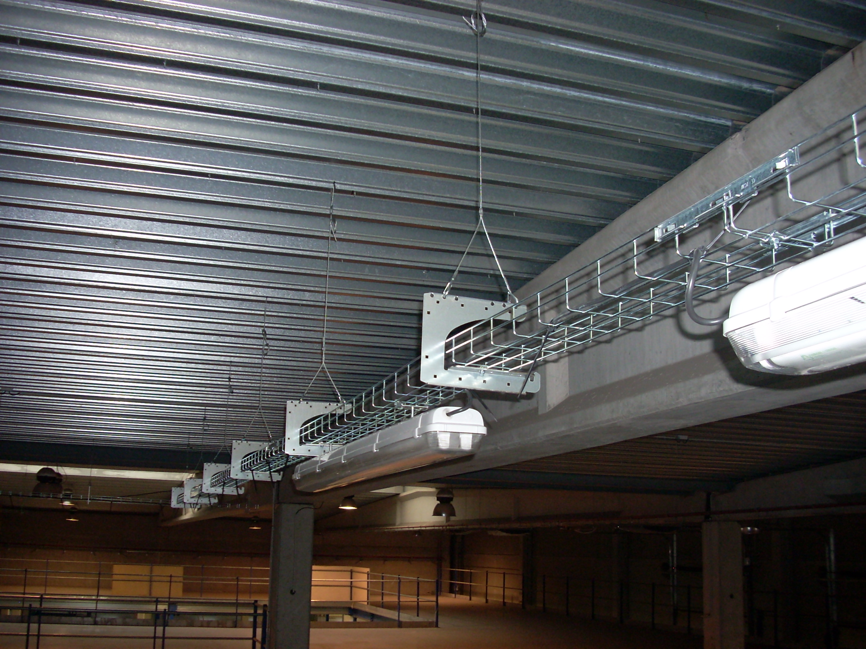 Suspension de chemin de câble avec accessoire Y embout crochet et étrier G Gripple